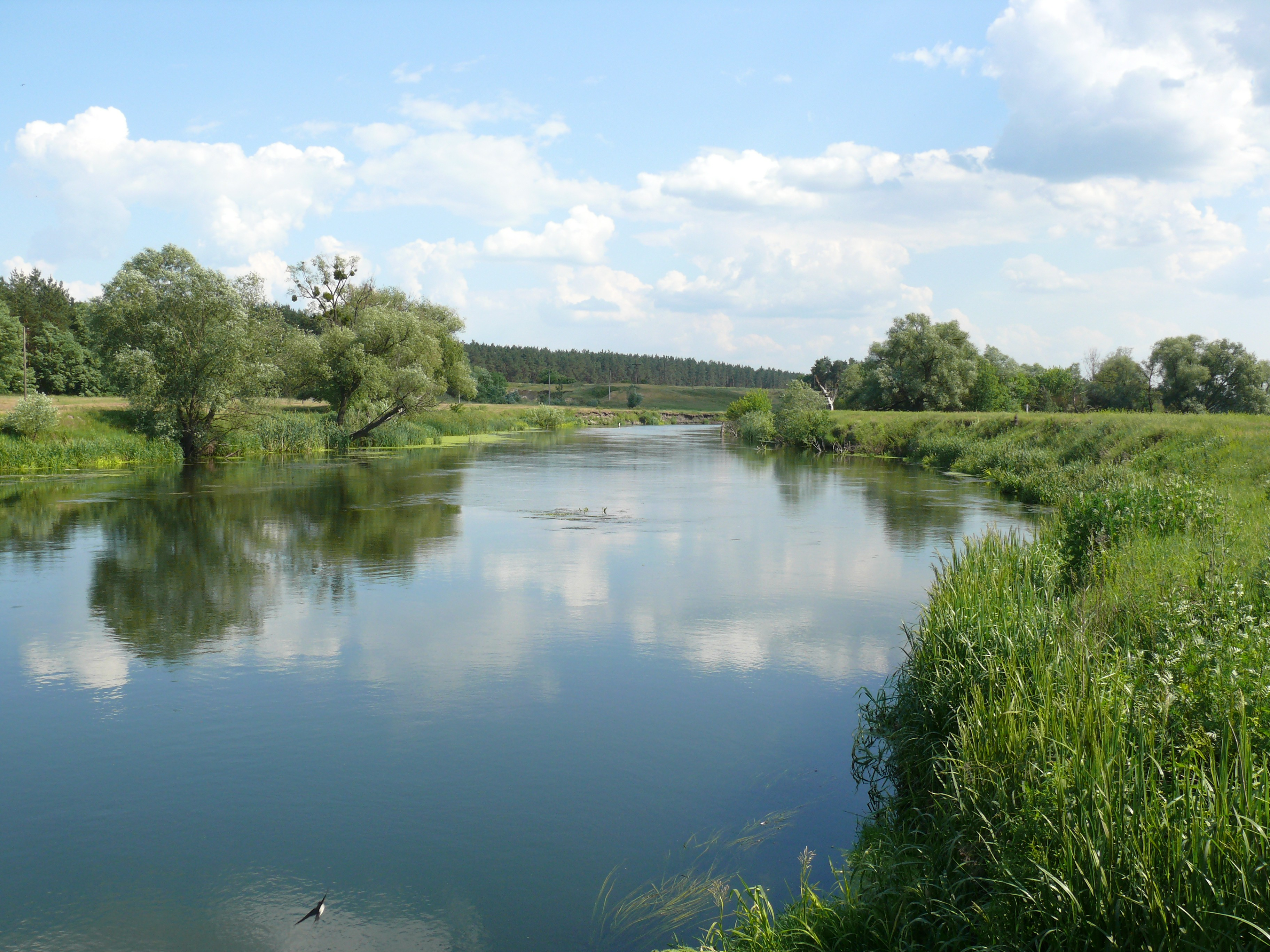 Вид на Северский Донец в Харьковской области между Эсхаром и Змиевым возле села Мохнач